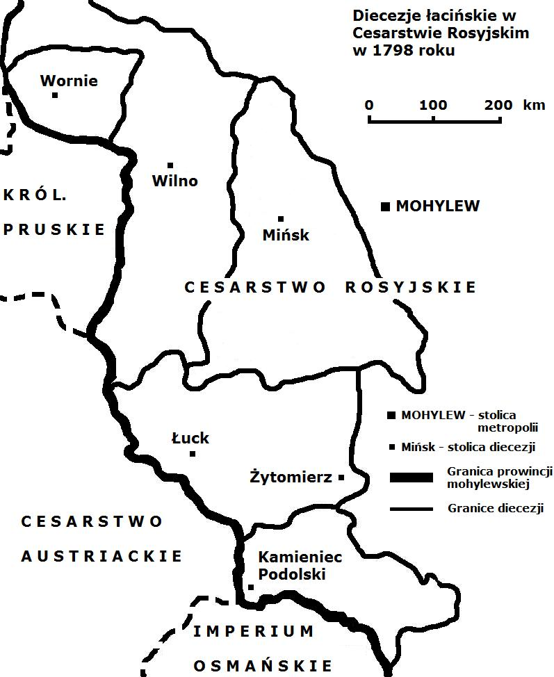 Diecezje łacińskie w Cesarstwie Rosyjskim w 1798 roku, powołane ukazem Pawła I, zatwierdzone dekretem nuncjusza apostolskiego Wawrzyńca Litty.